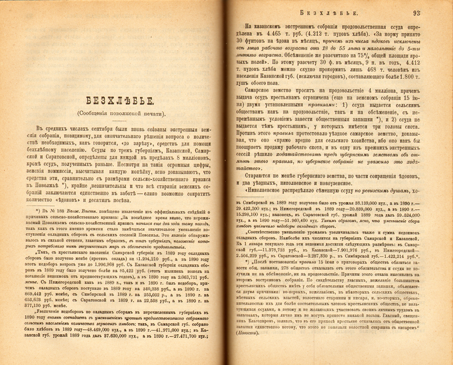 "Бесхлебье". Очерк Глеба Успенского. "Русская мысль", 1891, ноябрь